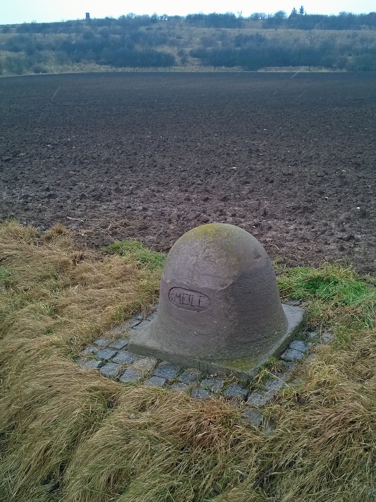 preußischer Viertelmeilenstein in Aseleben